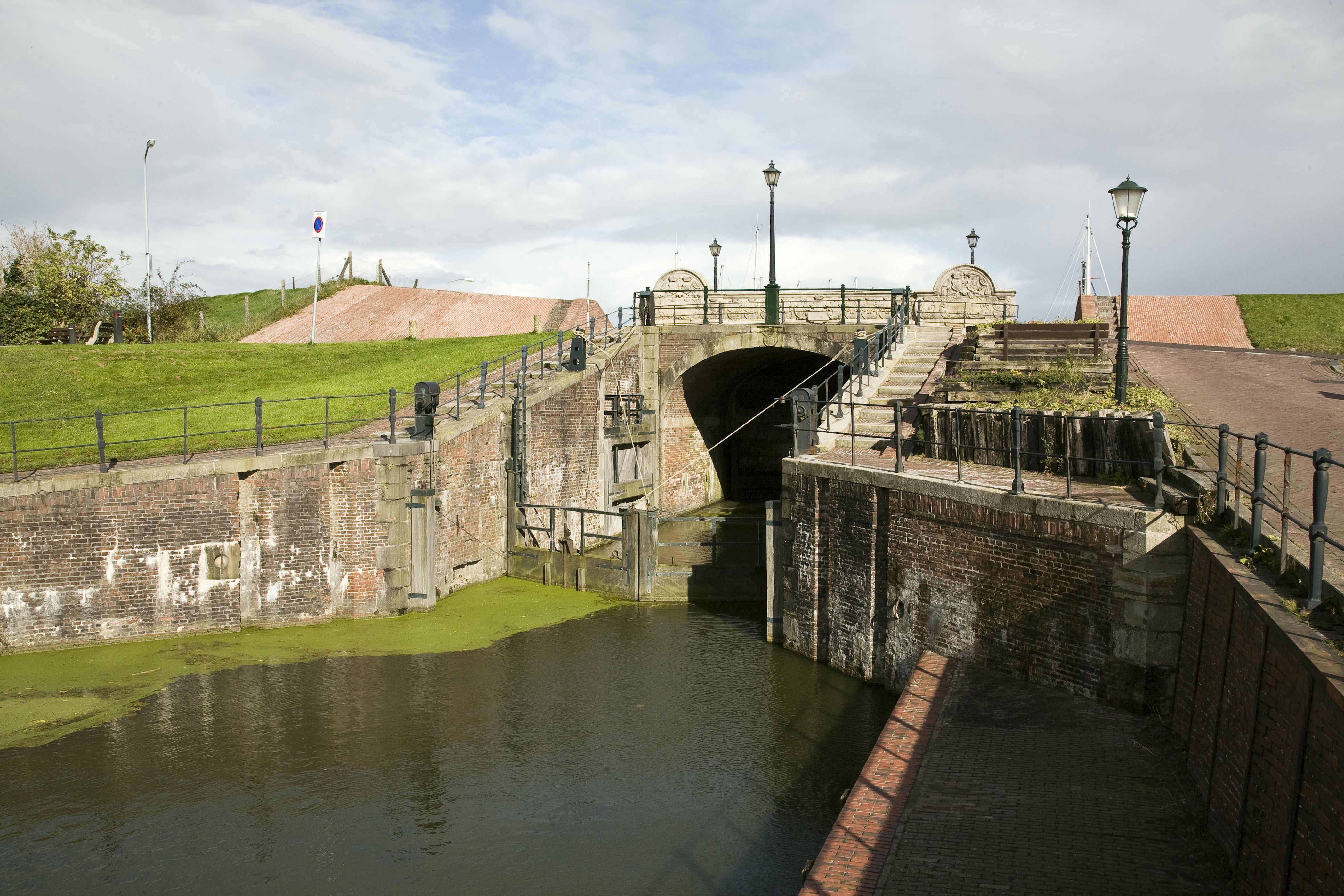 Stenen brug: Overzicht sluis (opmerking: Publicatie: TRAP Appingedam en Delfzijl (Cultuur Historische Routes in Nederland - 59))